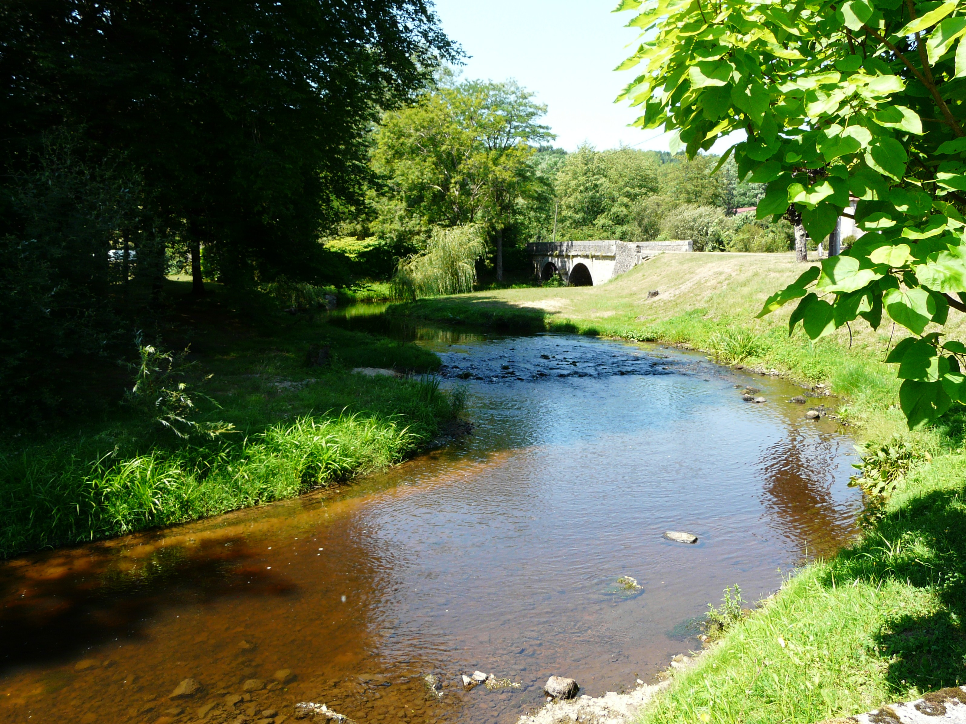 Le Trieux juste à l'ouest du bourg de Busserolles, Dordogne, France. Vue prise en direction de l'amont.